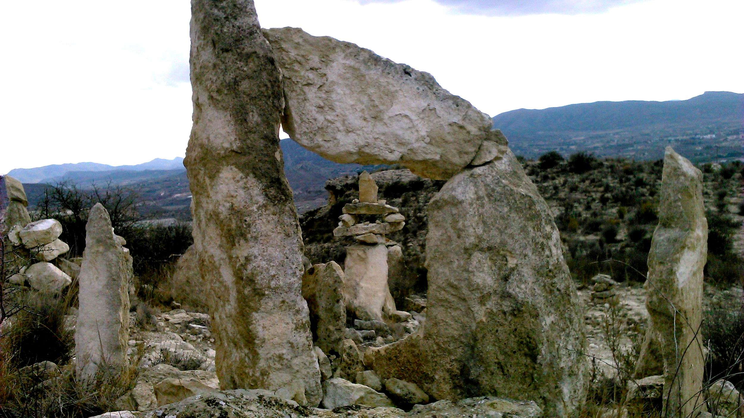 Monolitos de piedra. Sierra de Bateig. Elda.